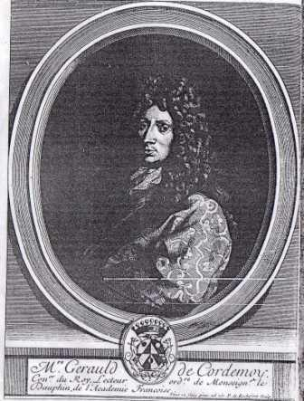 French philosopher Géraud de Cordemoy (1626-1684)